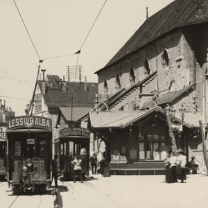 Tramaway, Kiosque Place Saint François (Lausanne) entre 1896 et 1897.